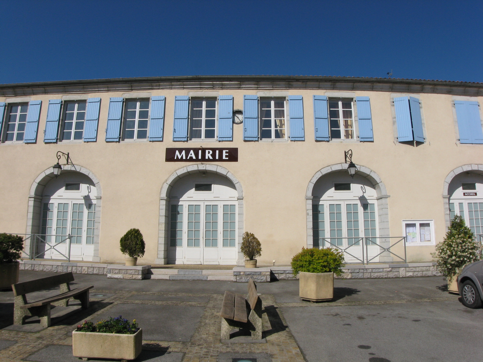 Mairie de Labastide-Villefranche (Pyrénées-Atlantiques) (Pyrénées).